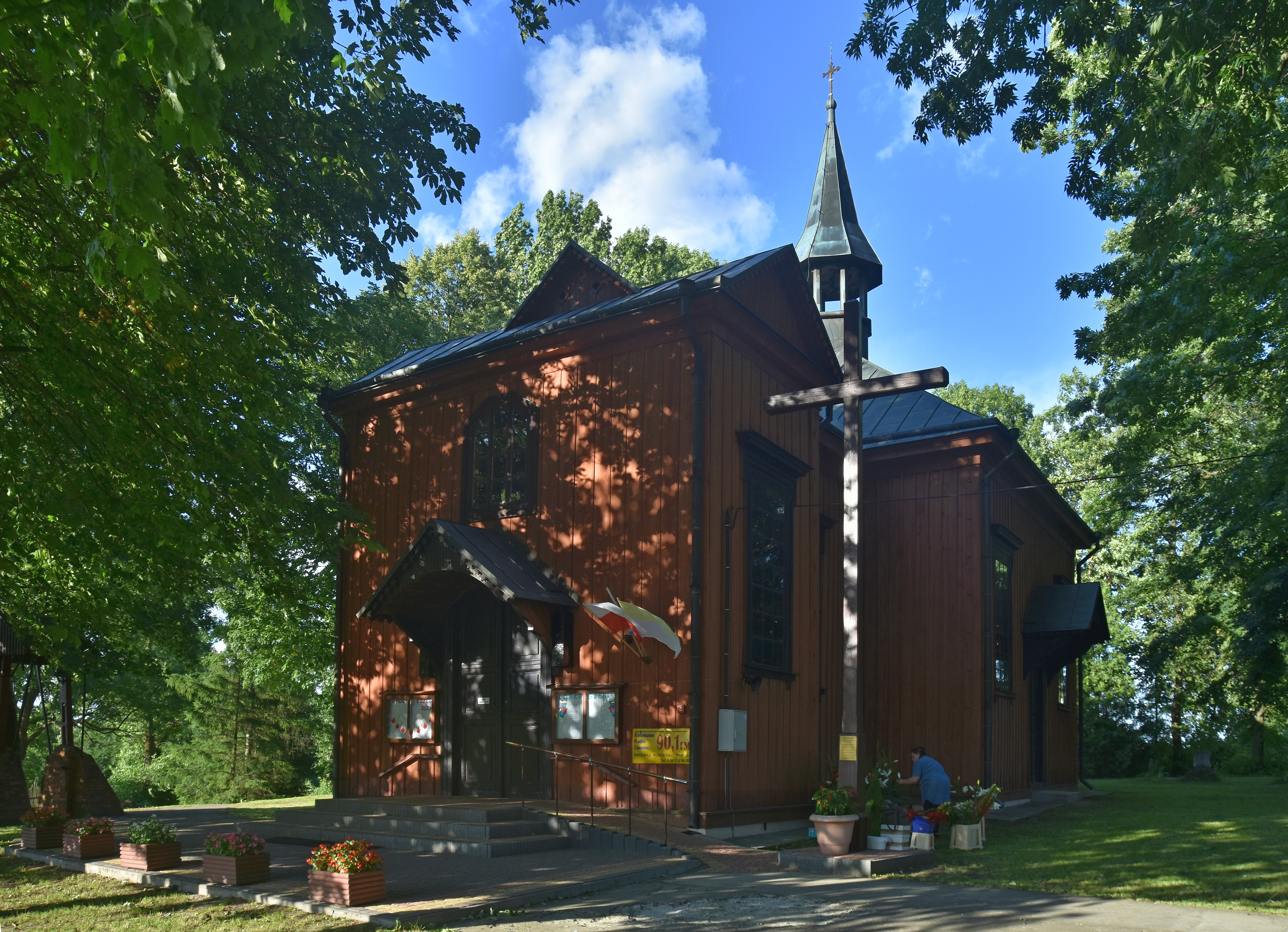 Wiszniów, Cerkiew greko-kat., ob. kościół rzym.-kat. św. Stanisława